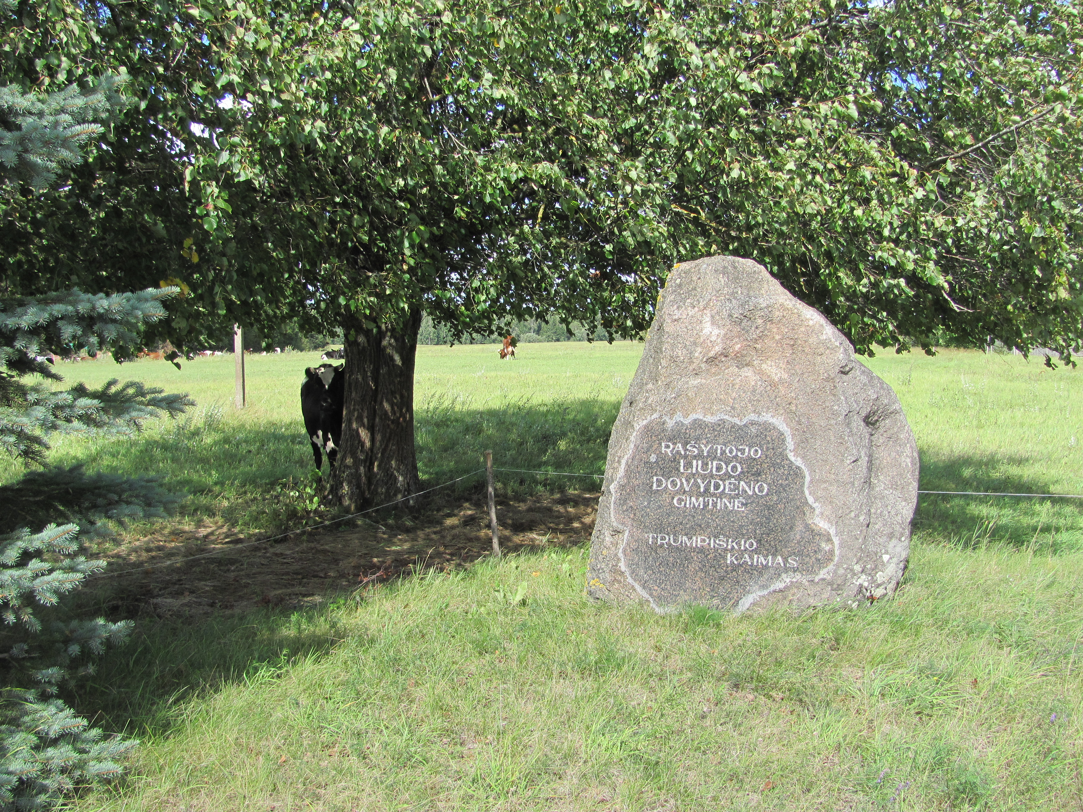 Rašytojo Liudo Dovydėno gimtinė